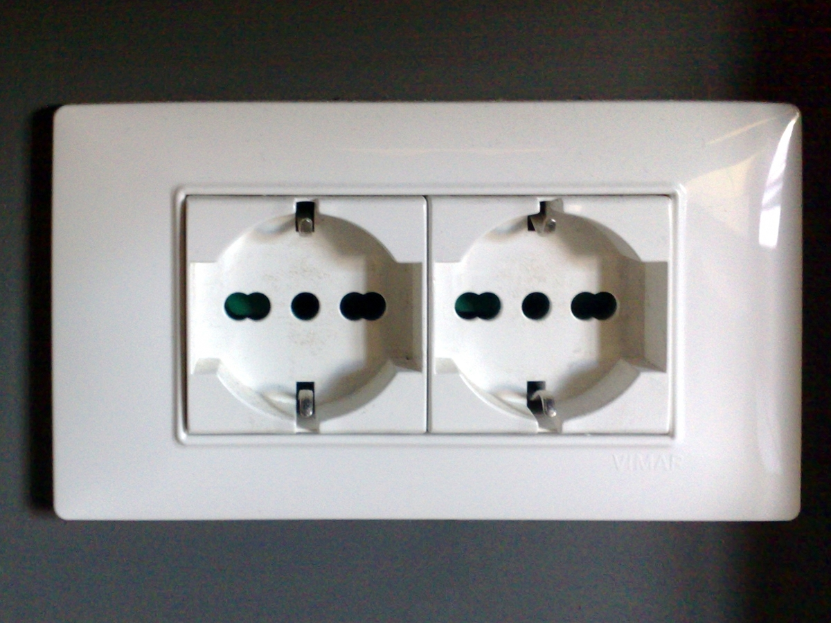 Vimar Plana 4 moduli 2 prese (P 40)